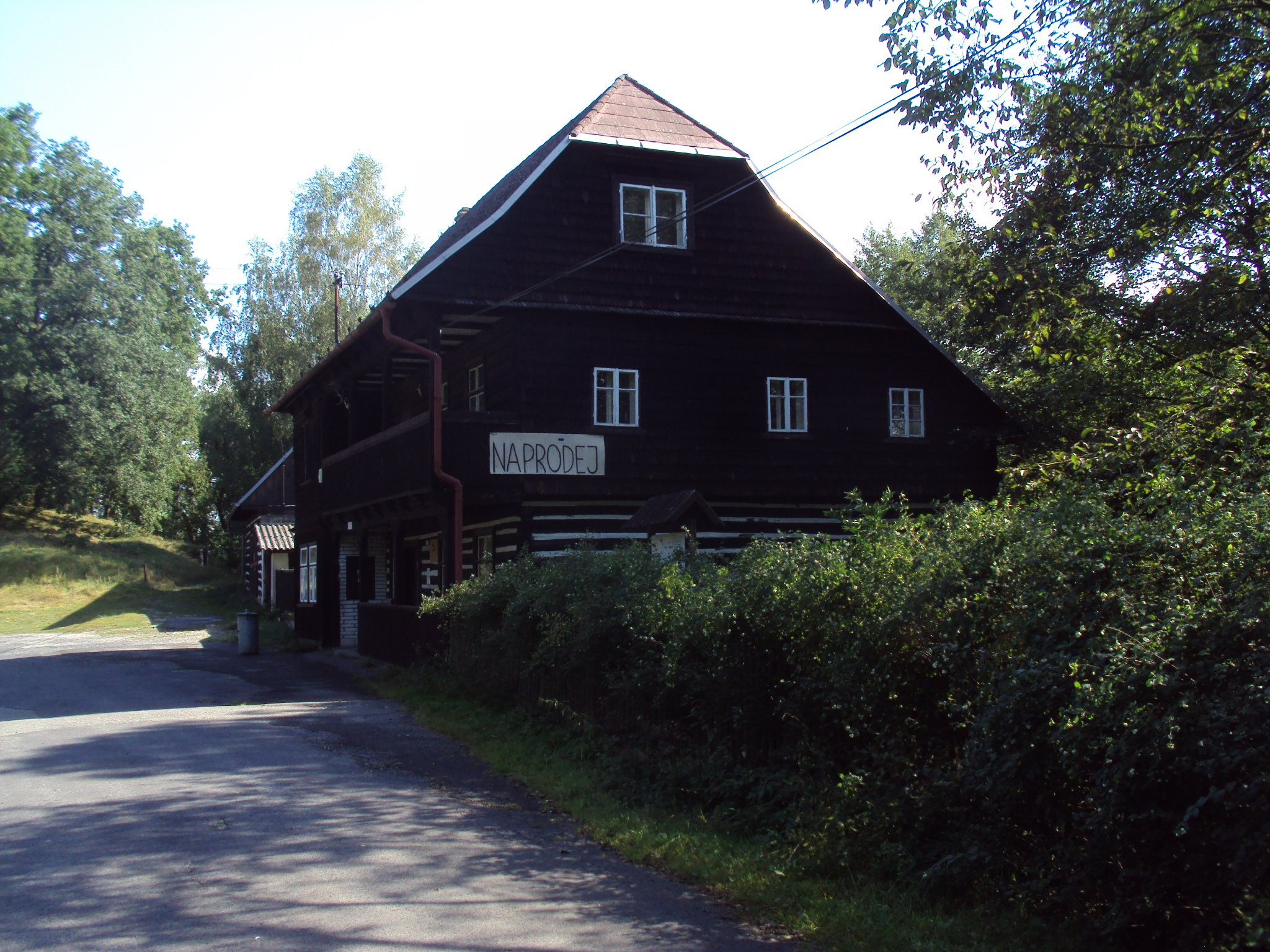 Památkově chráněné stavení na kraji vesničky Břehyně patřilo Vojenským lesům, nyní na prodej